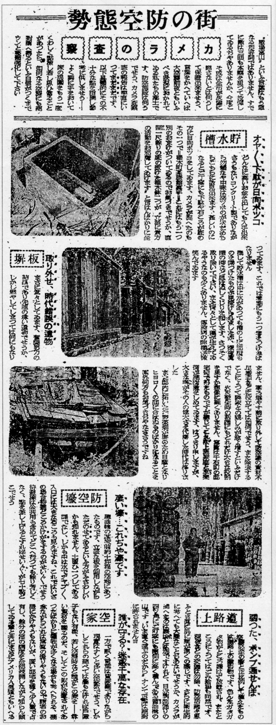 空襲防備を強化する富山市